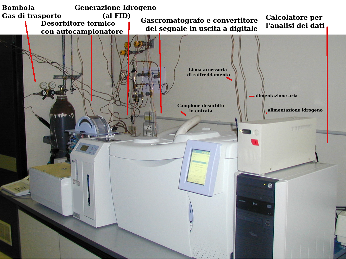 Laboratorio di gascromatografia con strumentazione per l'analisi di campioni desorbiti termicamente, tramite rivelatore a ionizzazione di fiamma. Foto personale dell'autore. Foto di libero utilizzo